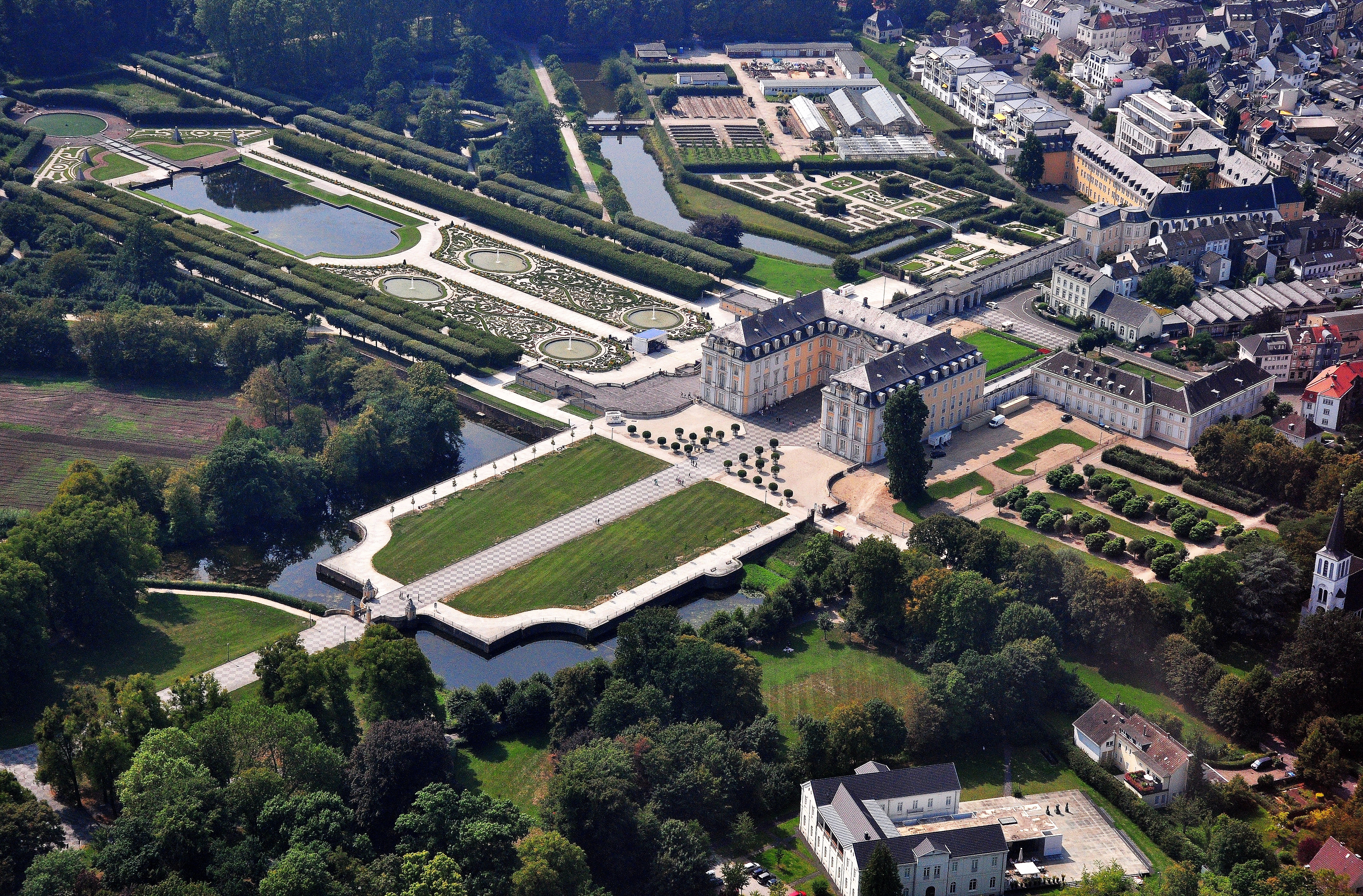 Schloss Brühl, Luftbild aus nordöstlicher Richtung. Unten rechts Max-Ernst-Museum und Christuskirche